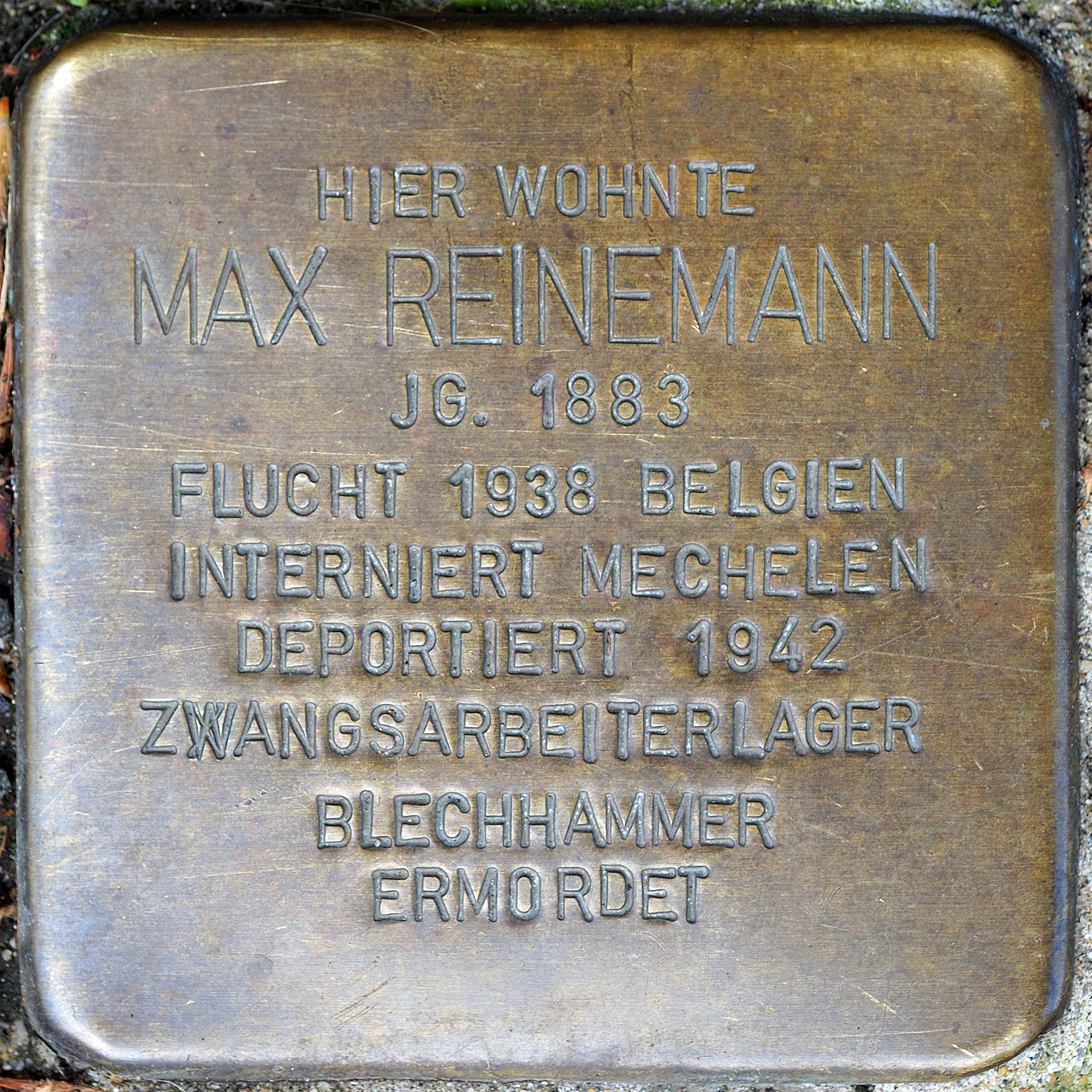 Stolpersteine MG: Reinemann, Max